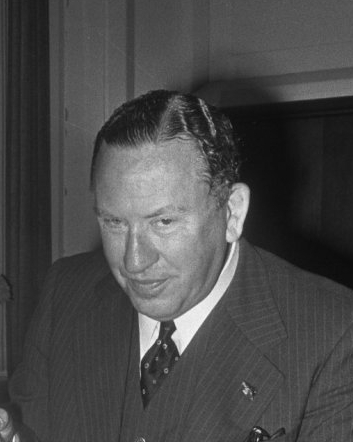 Hedzer Rijpstra